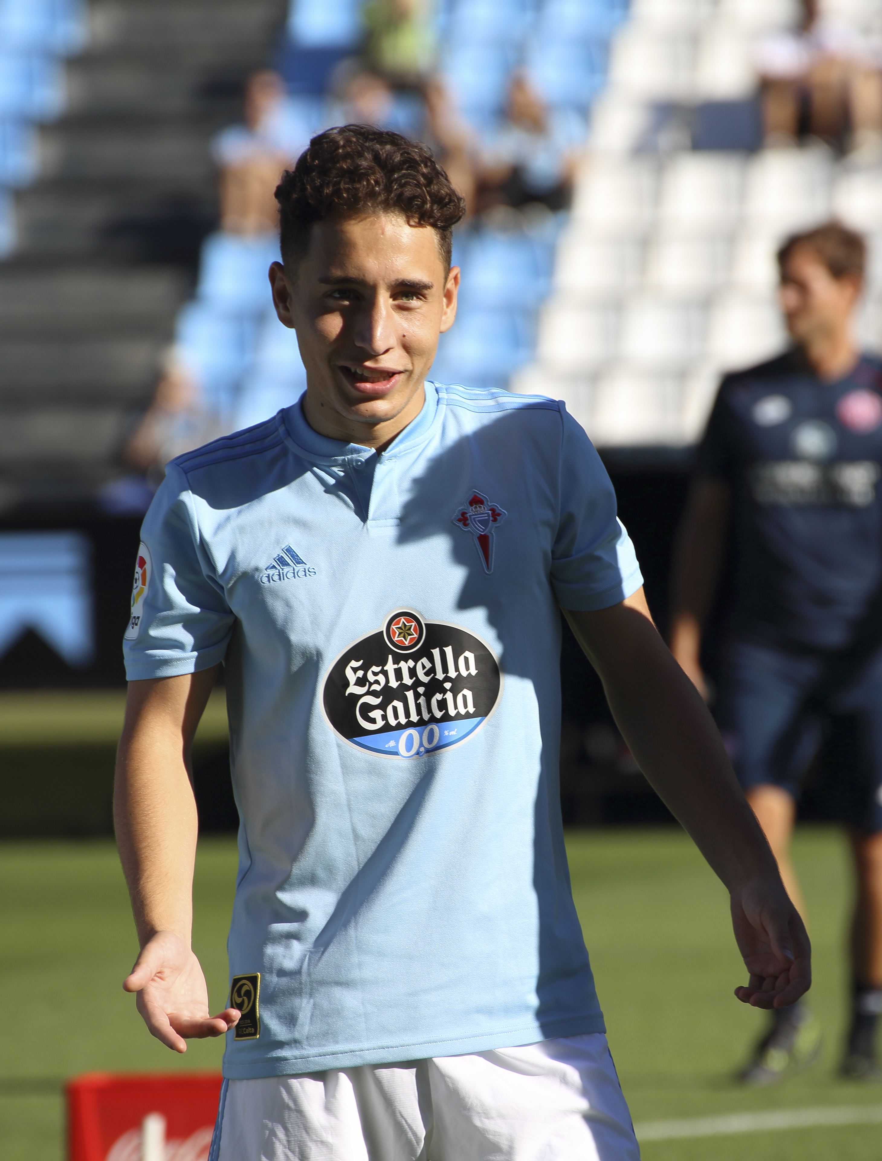 Presentación RC Celta - Temporada 18/19